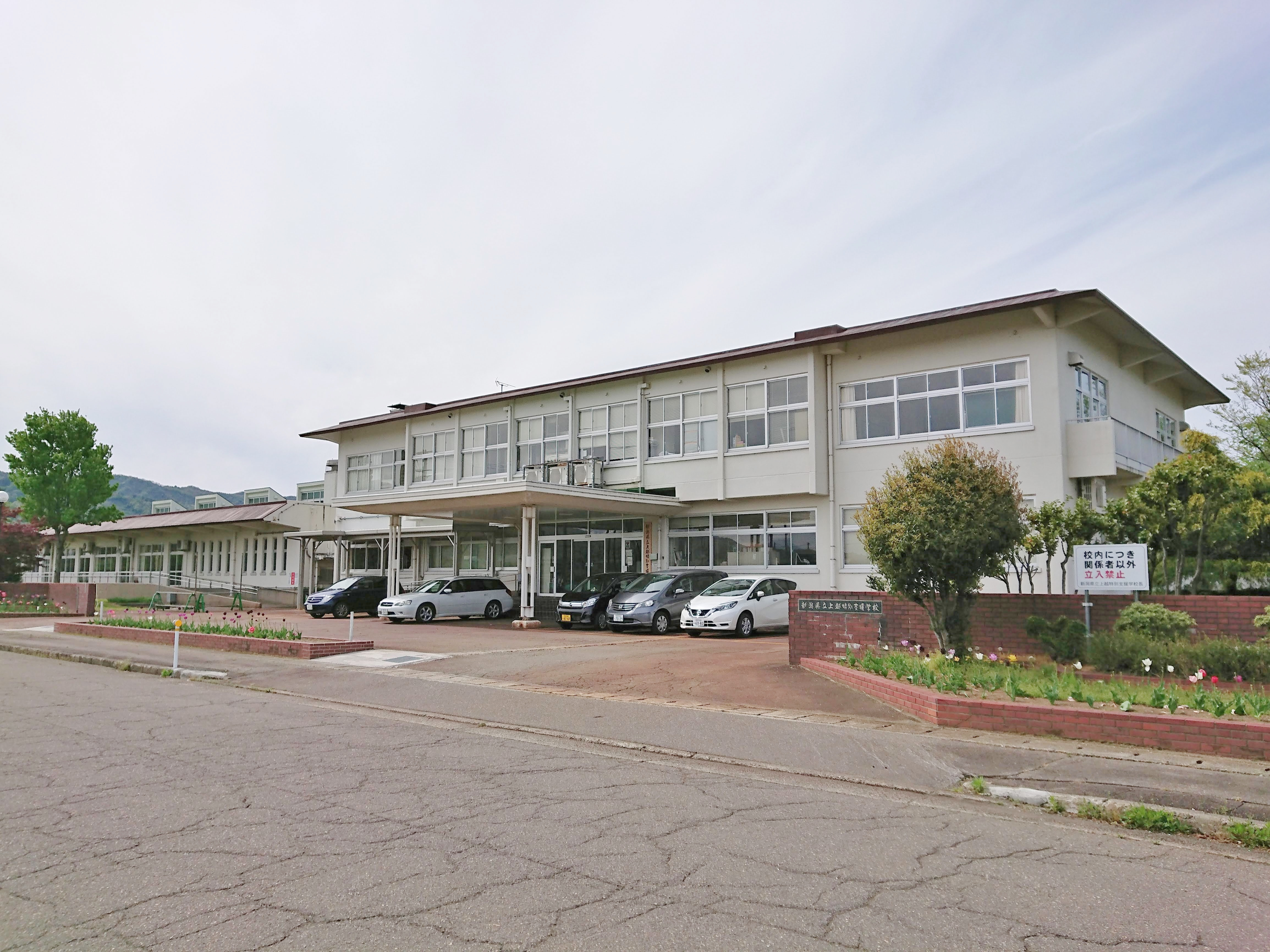 新潟県立上越特別支援学校の校舎外観